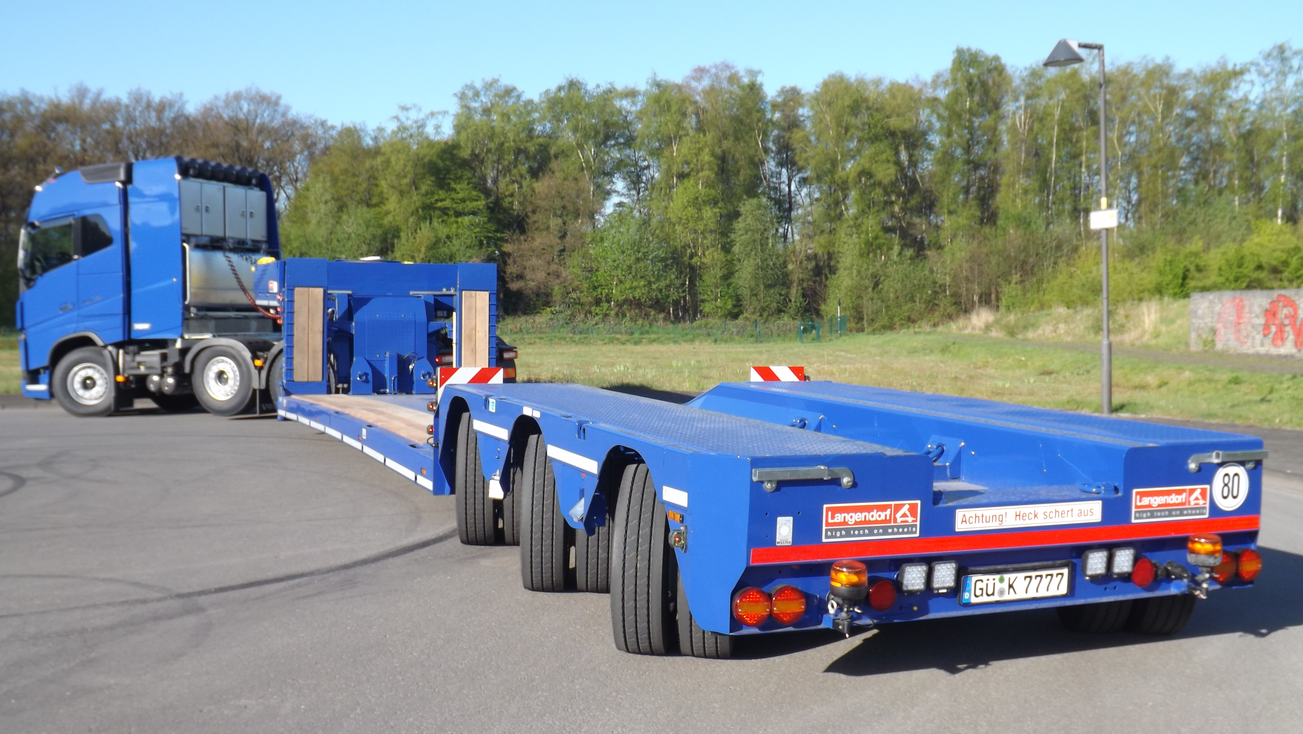 Satteltieflader zur Beförderung von Baumaschinen und Schwergut